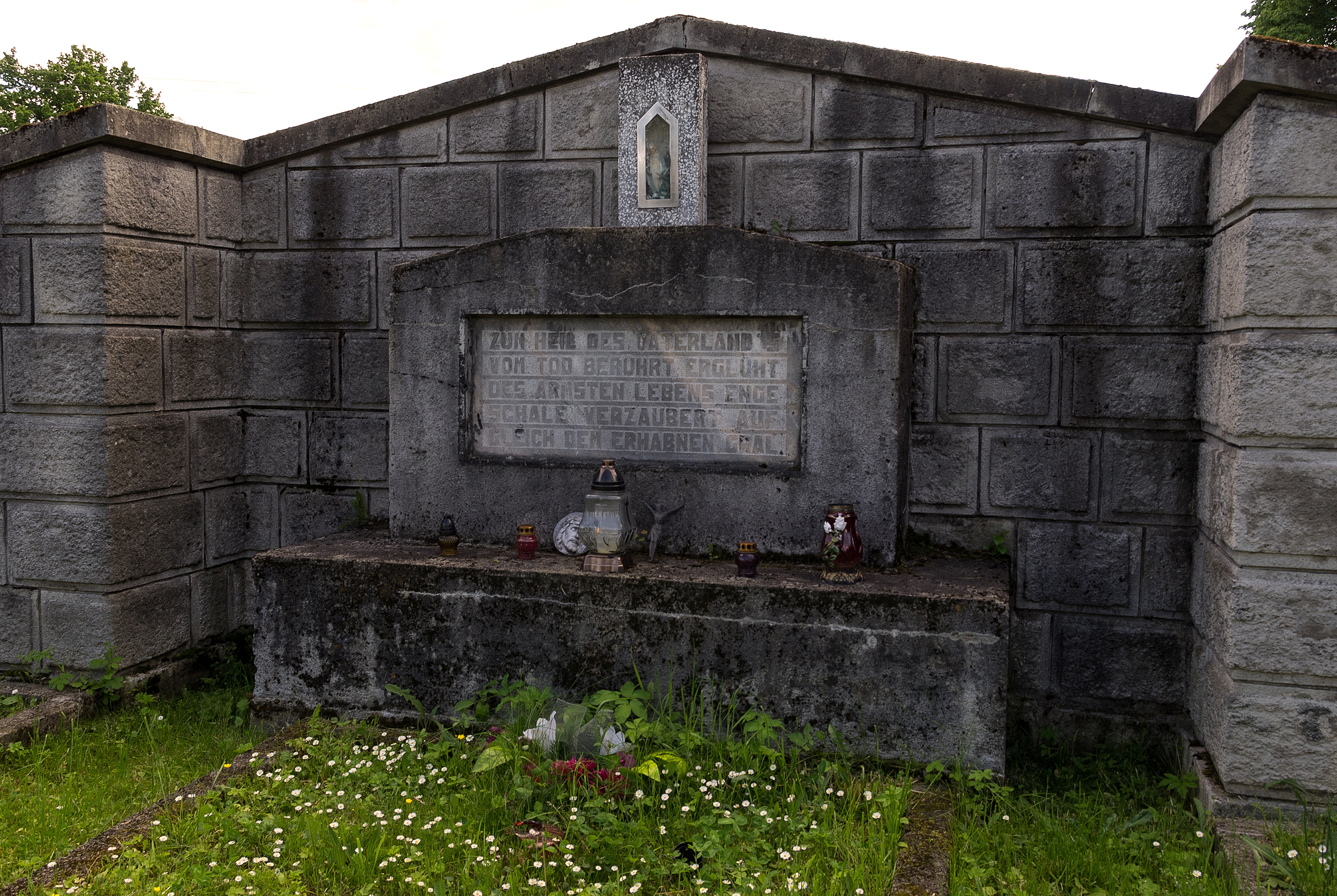 Cmentarz wojenny nr 286 Olszyny